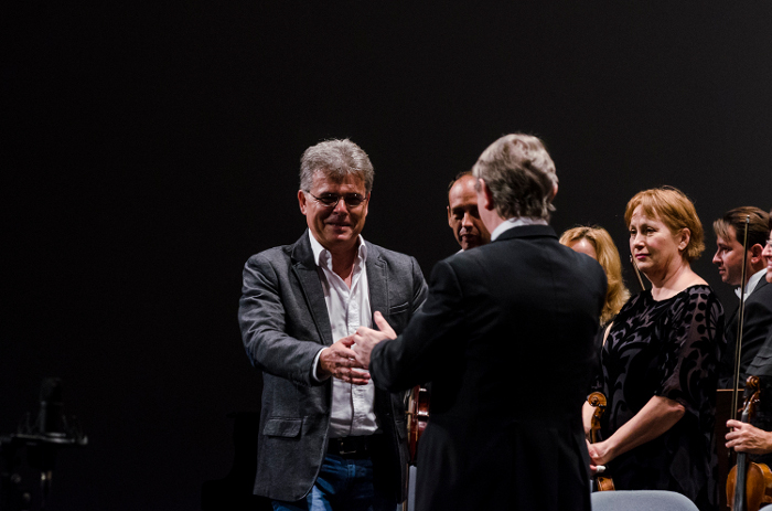 Saludo al Director Victor Pablo